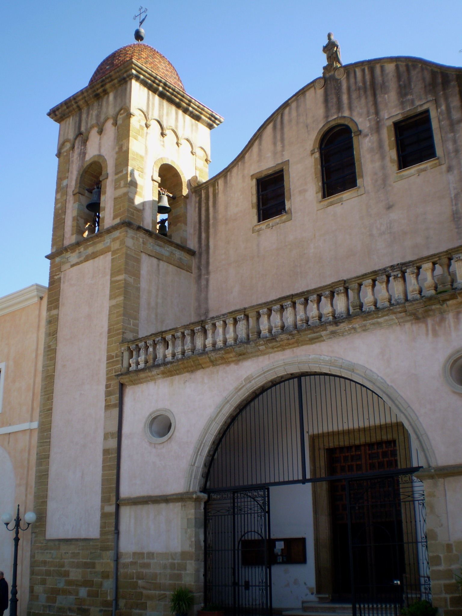 Cattedrale di Ales Facciata